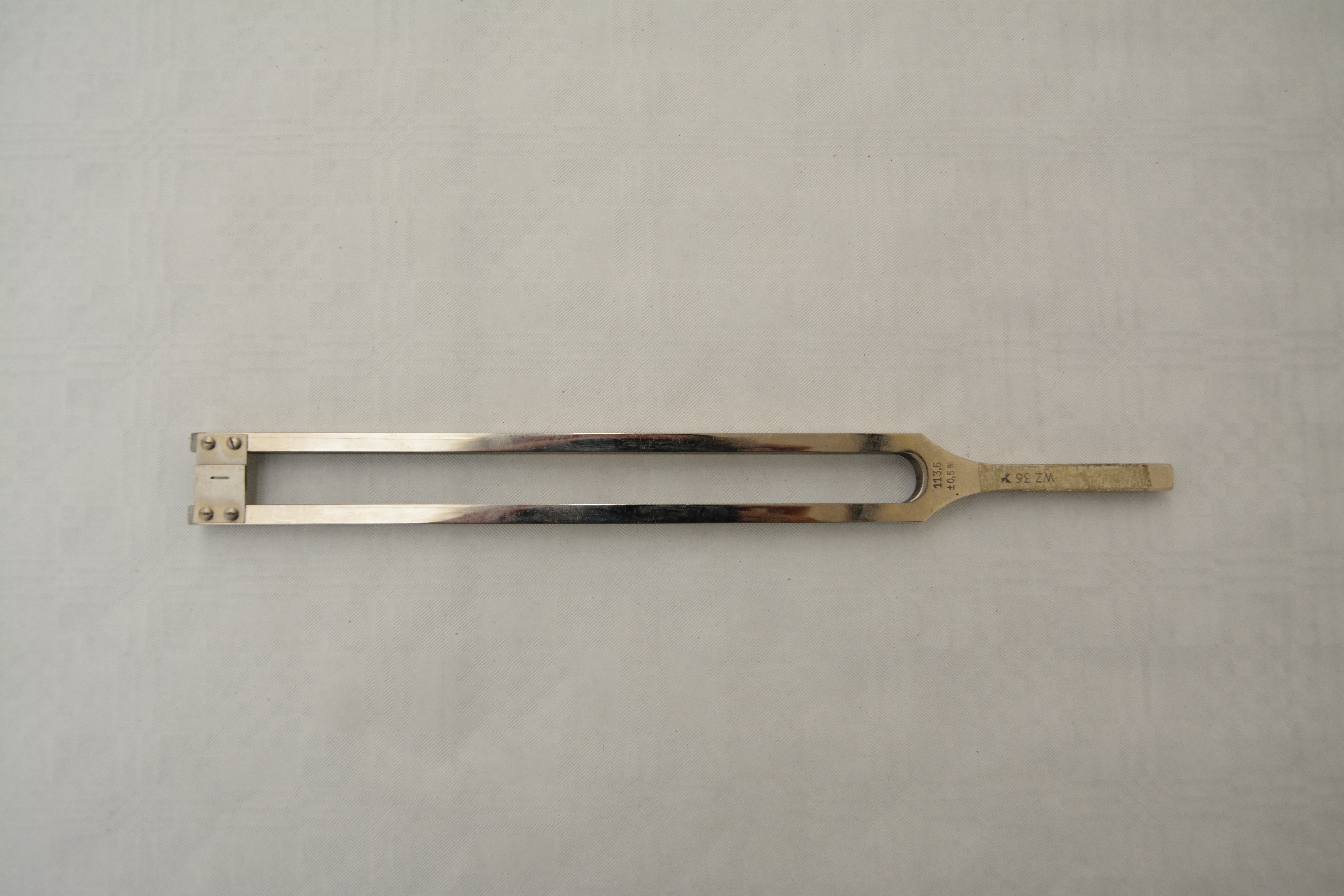 Eine Stimmgabel zum Einstellen der Motordrehzahl eines Fernschreibers. Aufgenommen im ehemaligen Fernmeldezentralzeugamt Elmshorn The making of this document was supported by the Community-Budget of Wikimedia Germany.